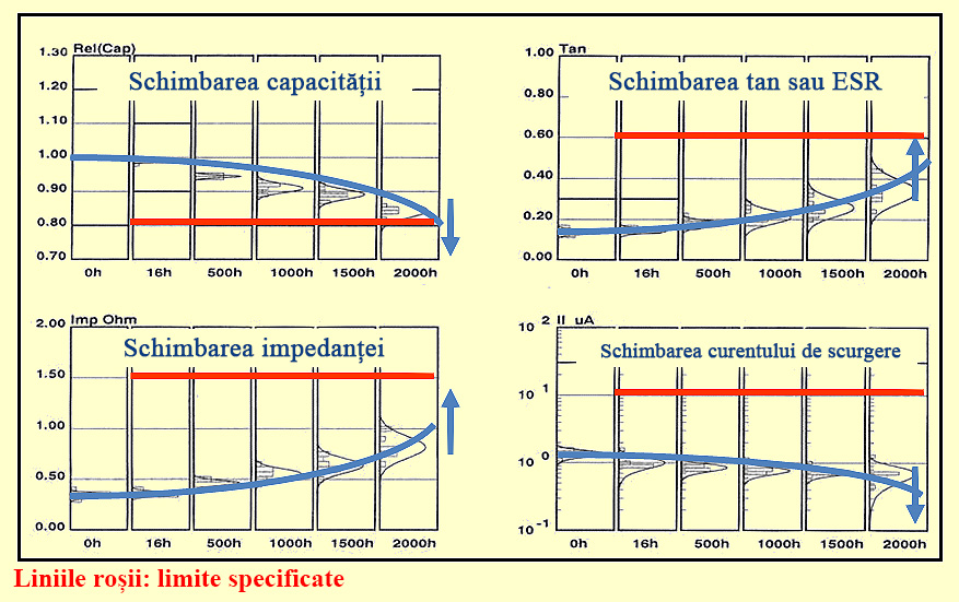 Rezultatele testelor de anduranta a condensatoarelor electrolitice